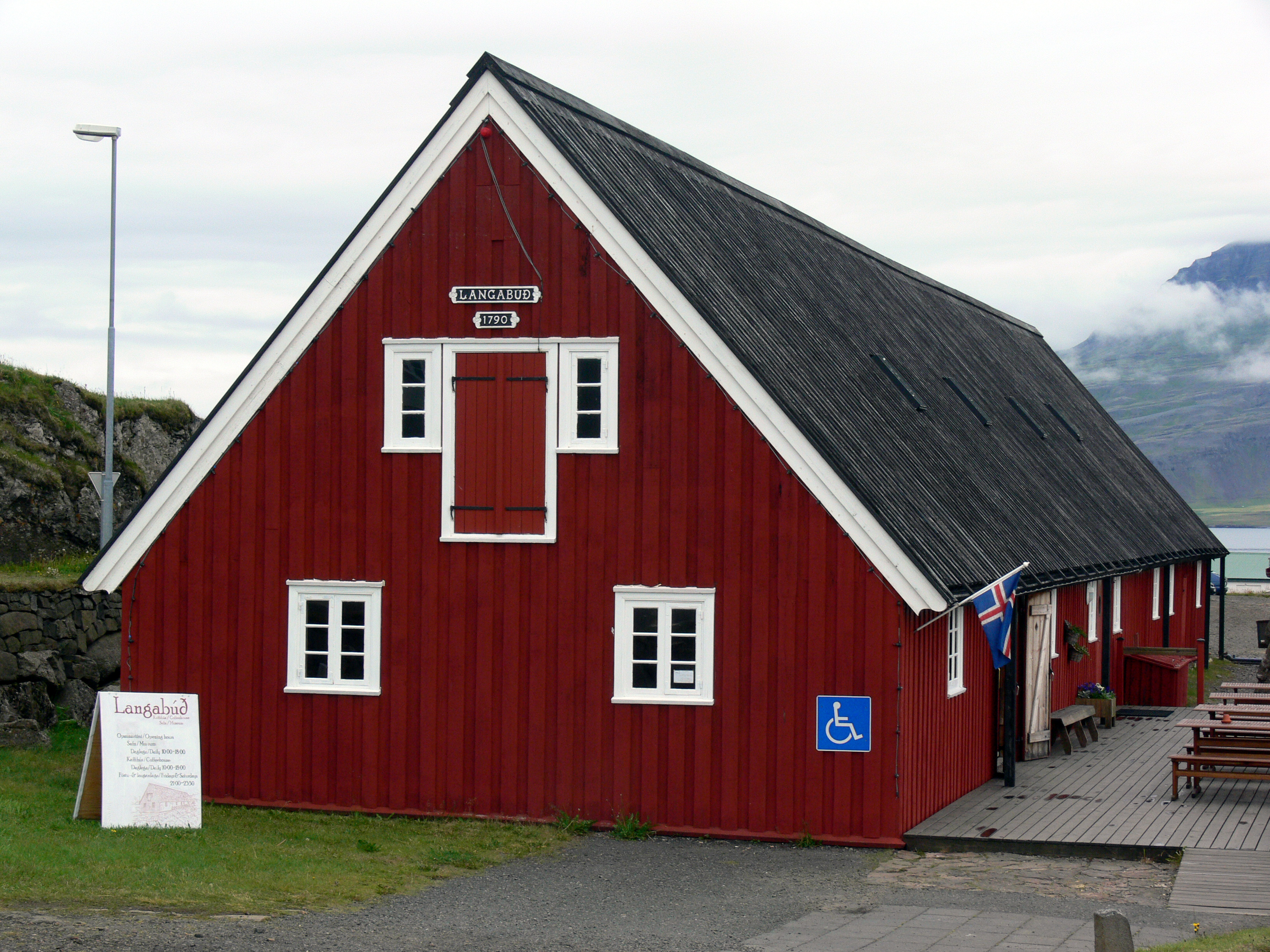 Djúpivogur; Langabúð - Museum. Ehemaliges Kaufhaus, ältestes Gebäude von Djúpivogur.